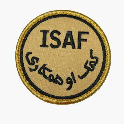 Емблема на ISAF